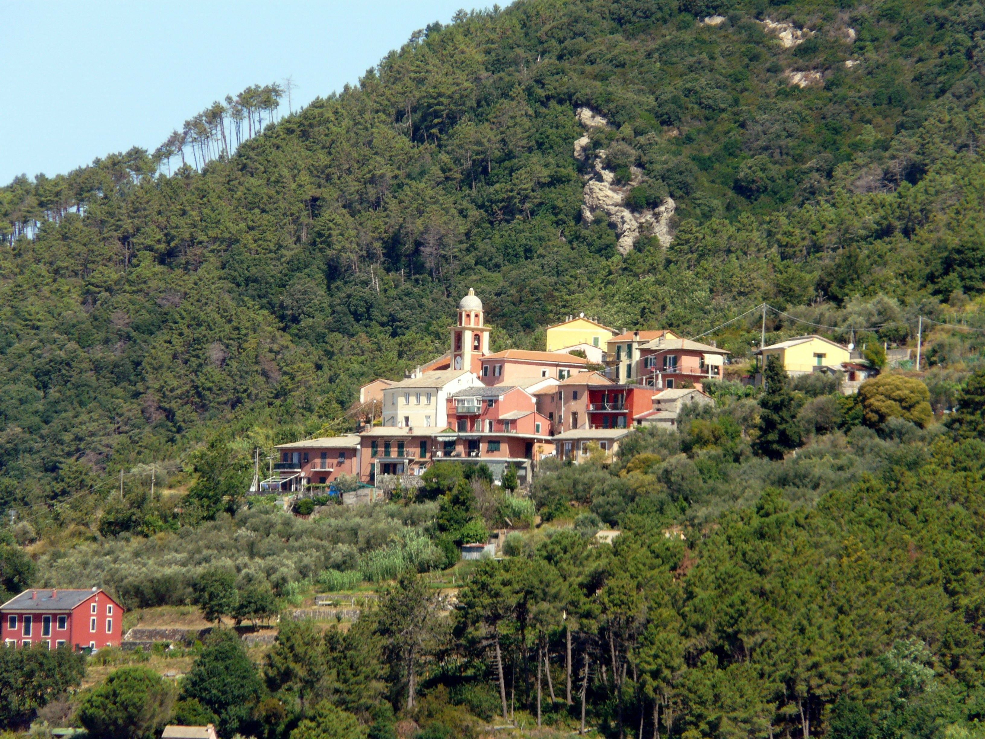 Panorama di Reggimonti, Bonassola, Liguria, Italia